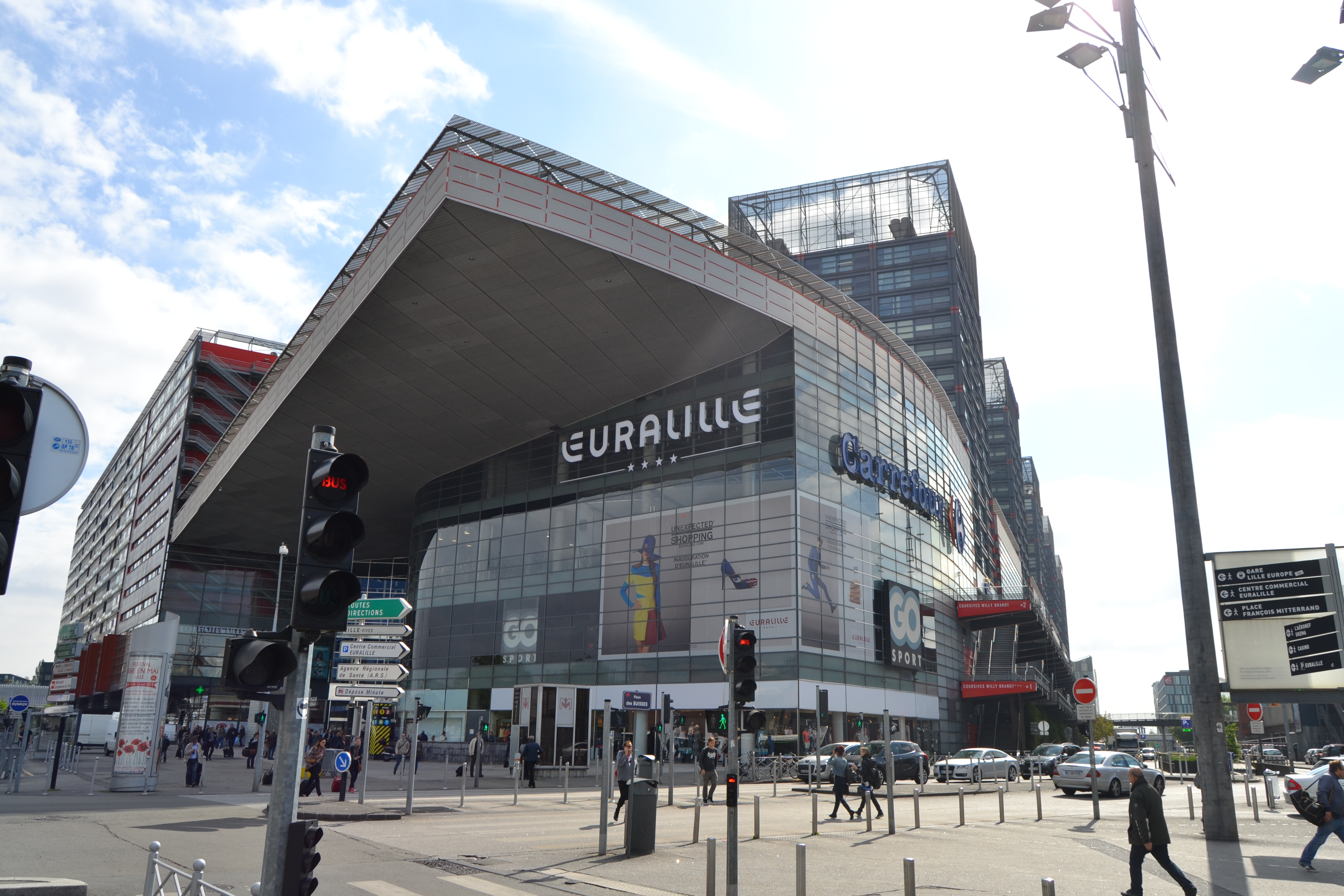 Le parvis du centre commercial Euralille